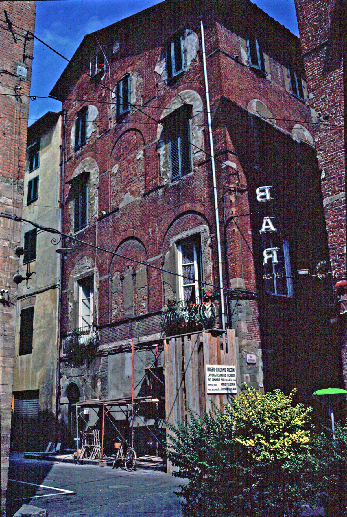 Fondazione Giacomo Puccini Museo Giacomo Puccini (Giacomo Puccini Foundation; Giacomo Puccini Museum) Corte San Lorenzo, 9 I-55100 Lucca Giacomo Puccini was born here 22nd December , 1858 Photo taken Autumn 1984 before the building was "restored".